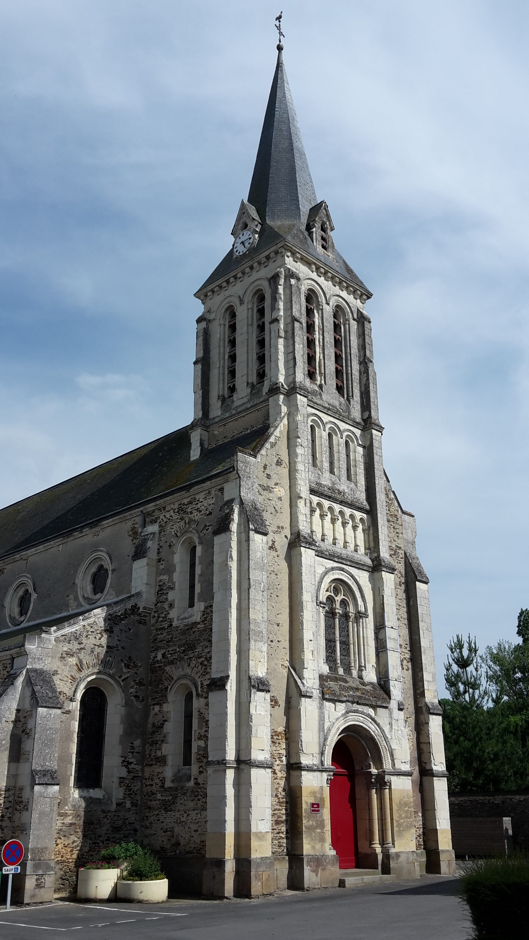 L'église de Loiré, Maine-et-Loire, France.